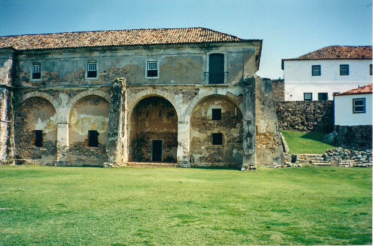 Fortaleza de Santa Cruz de Anhatomirim, ilha de Anhatomirim, SC, Brasil: aspecto do Quartel da Tropa.